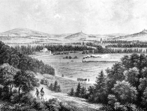 „Vom Allendorfer Wäldchen ist Heuchelheim zu sehen, dahinter der Vetzberg und links der Dünsberg. Im Vordergrund fährt ein Dampfzug in Richtung Wetzlar und ein Fuhrwerk nach Kleinlinden, in der Mitte ist die Eisensteinwäsche an der Lahn zu erkennen.“